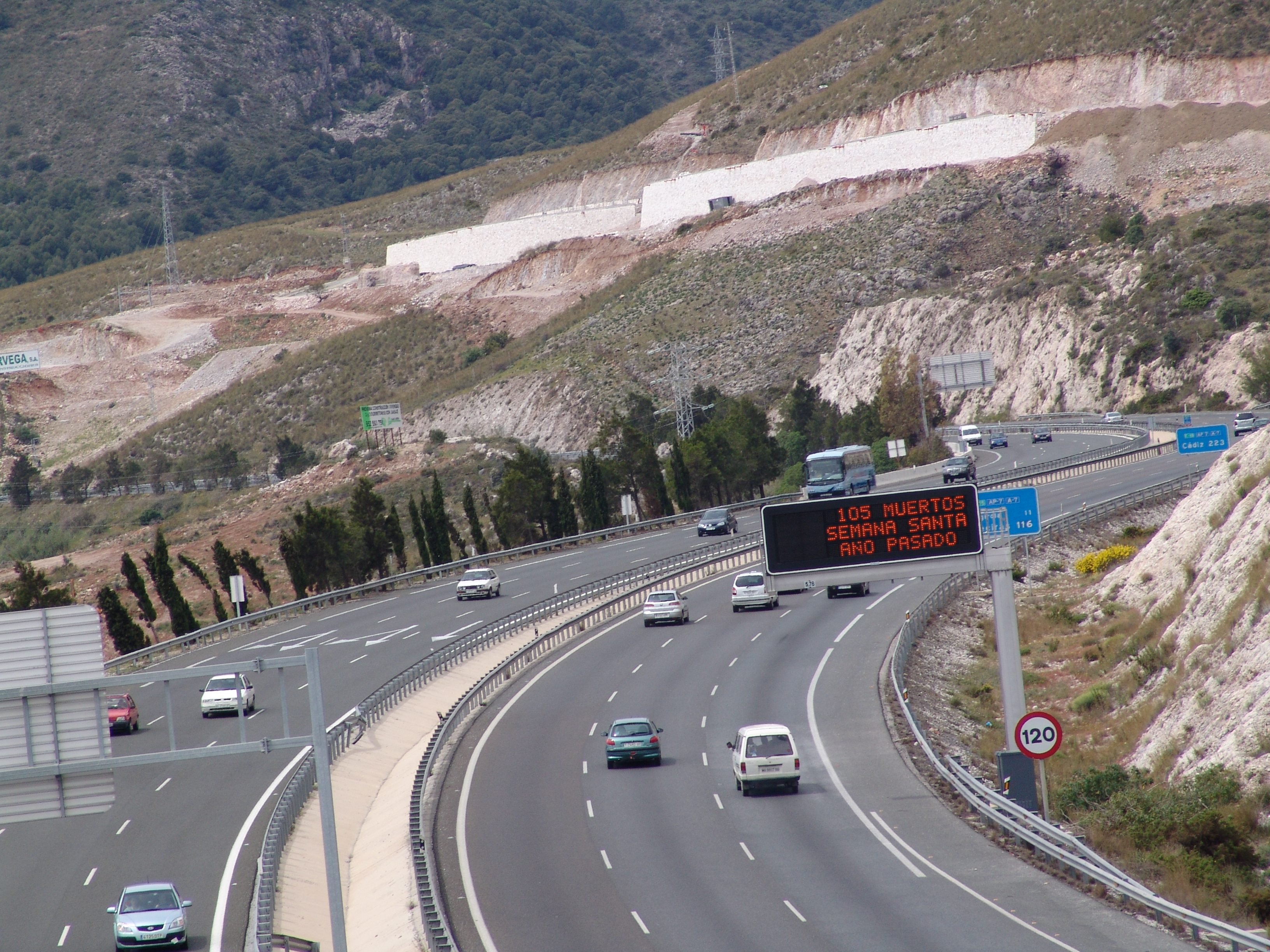 Autopista A-7 a su paso por Benalmádena (Málaga). Cabe destacar el panel electrónico que indica "105 muertos Semana Santa año pasado" La foto está tomada en abril de 2006 desde una cabina del teleférico de Benalmádena. A-7 motorway through Benalmádena (Málaga, Spain). The electronic display tells (translated): "105 dead during last years' Easter". The photograph was taken on april, 2006 from the Benalmádena cable car. Photograph by comakut.